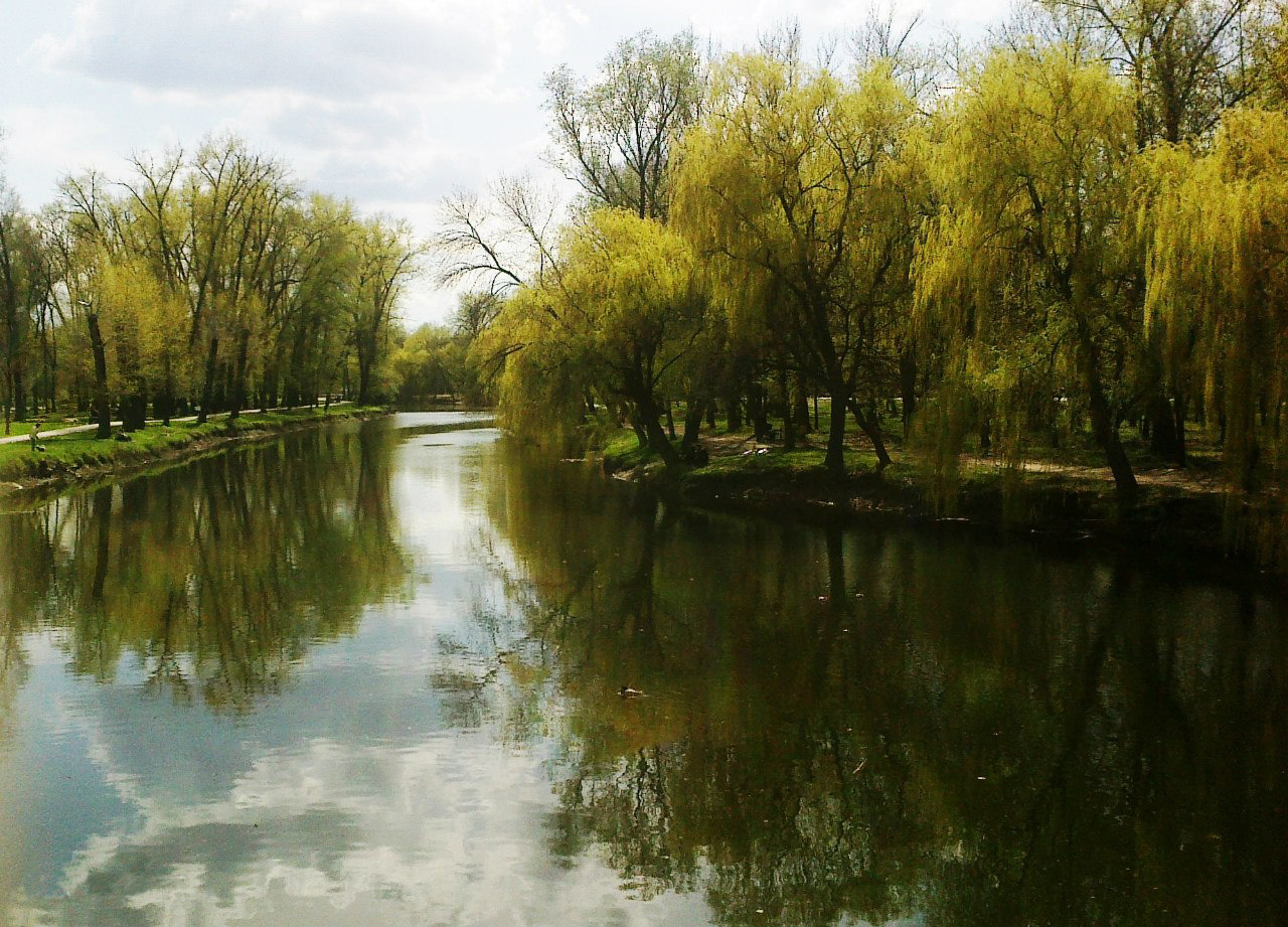 Парк Дубовая Роща, Запорожье